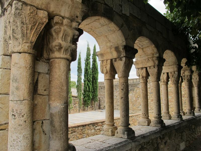 Claustro románico de Sant Domenech (Perelada)